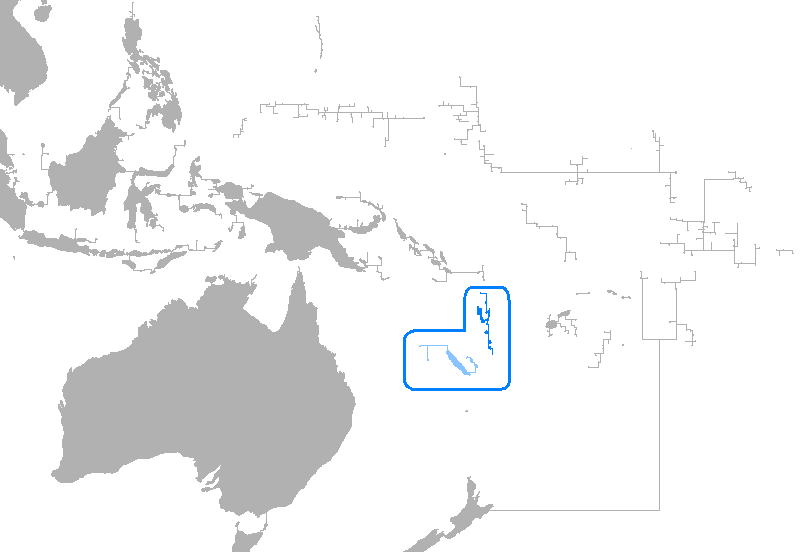 Donde es mayoritario Donde es minoritario